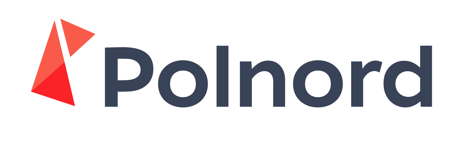 Logo Polnord S.A.